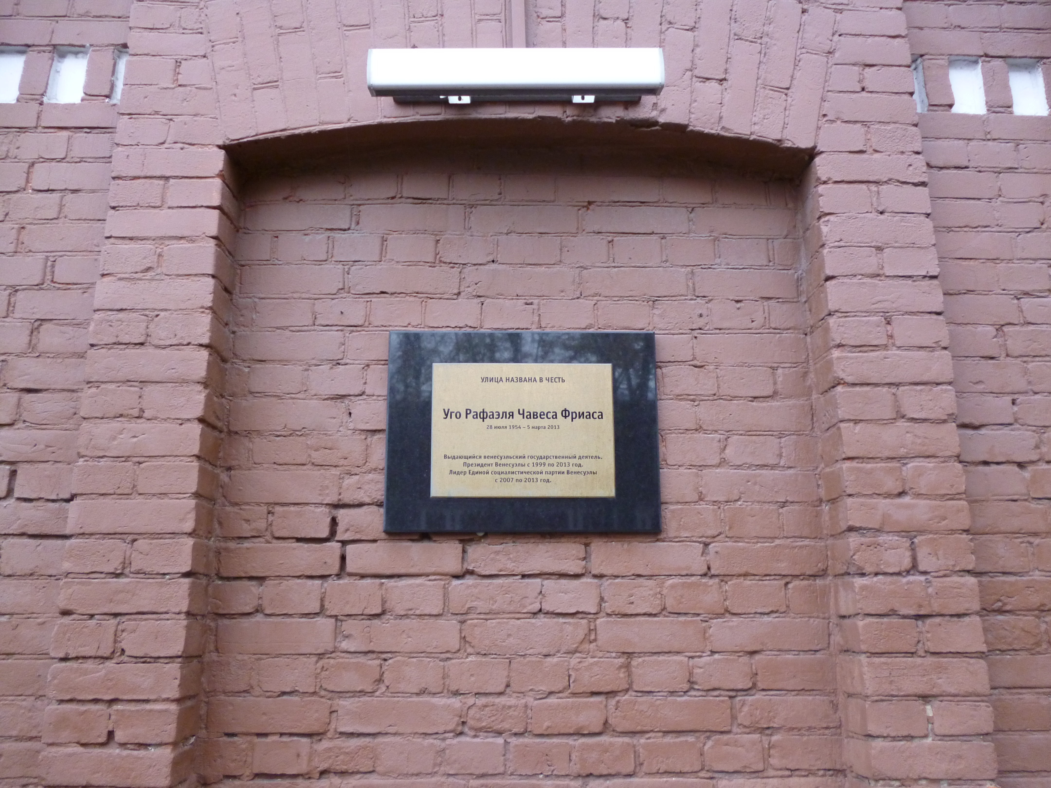 Памятная доска на улице Уго Чавеса в Москве.